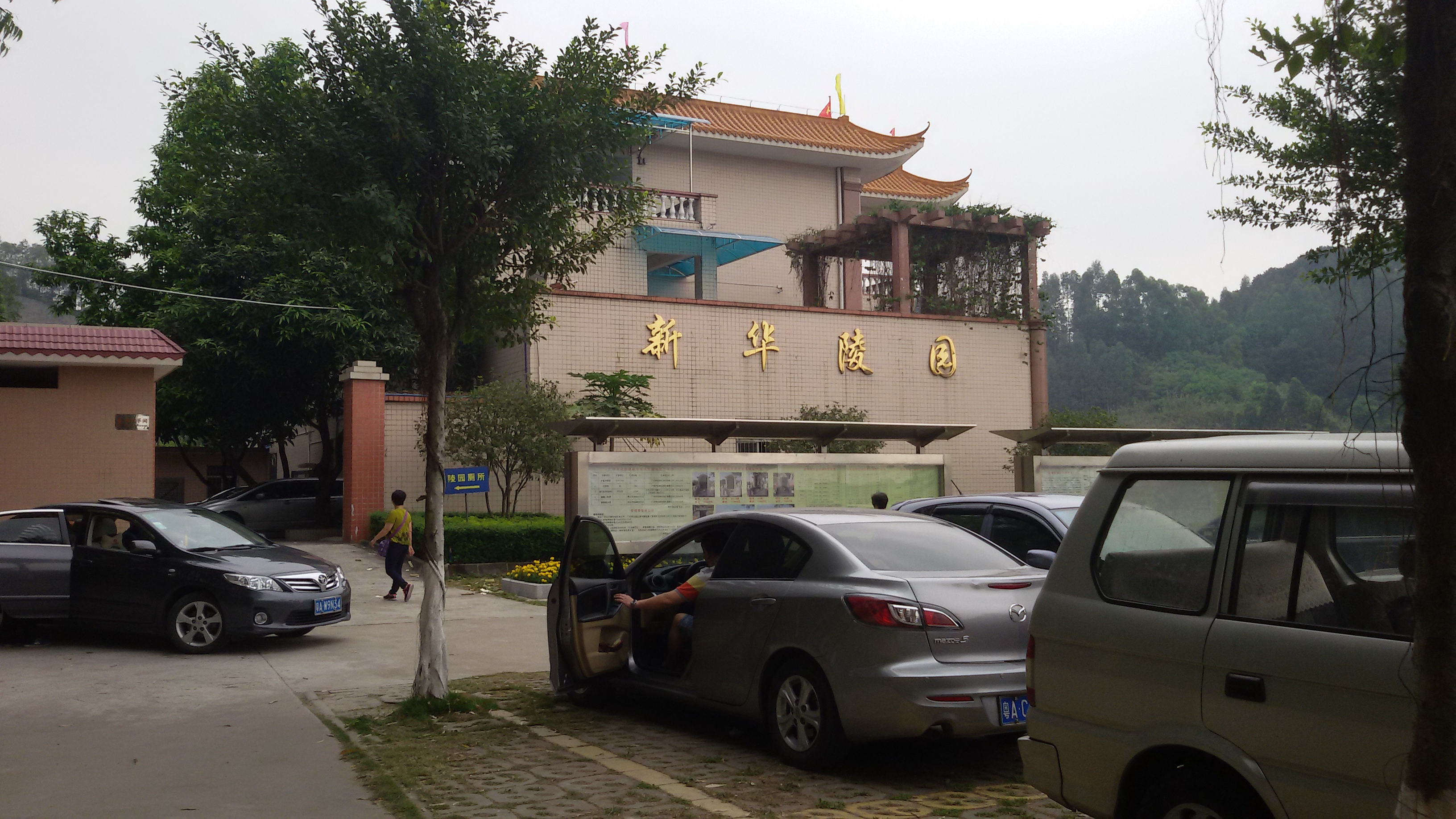 粵語: 花都新華陵園